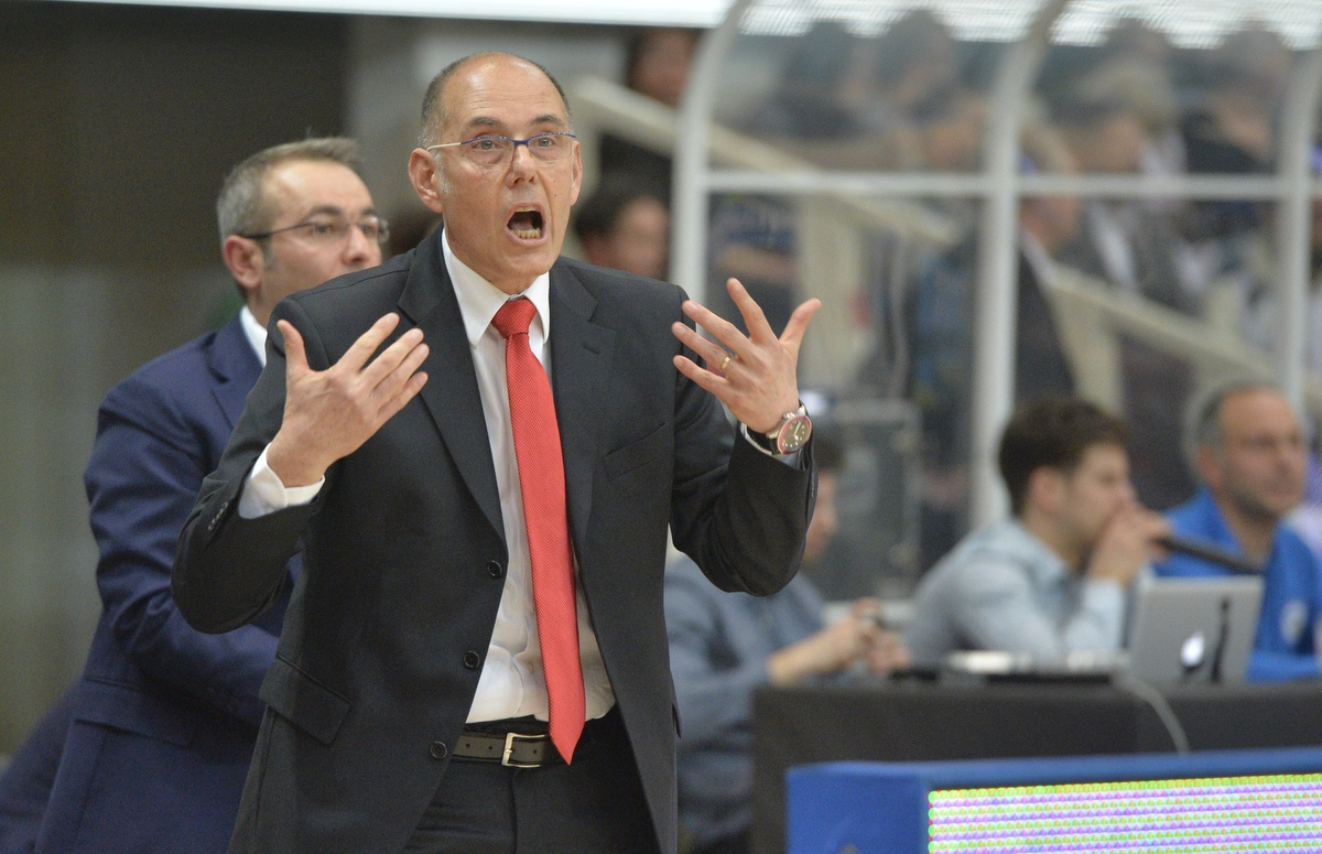 Immagine rilasciata dal proprietario della stessa, pallacanestro Varese